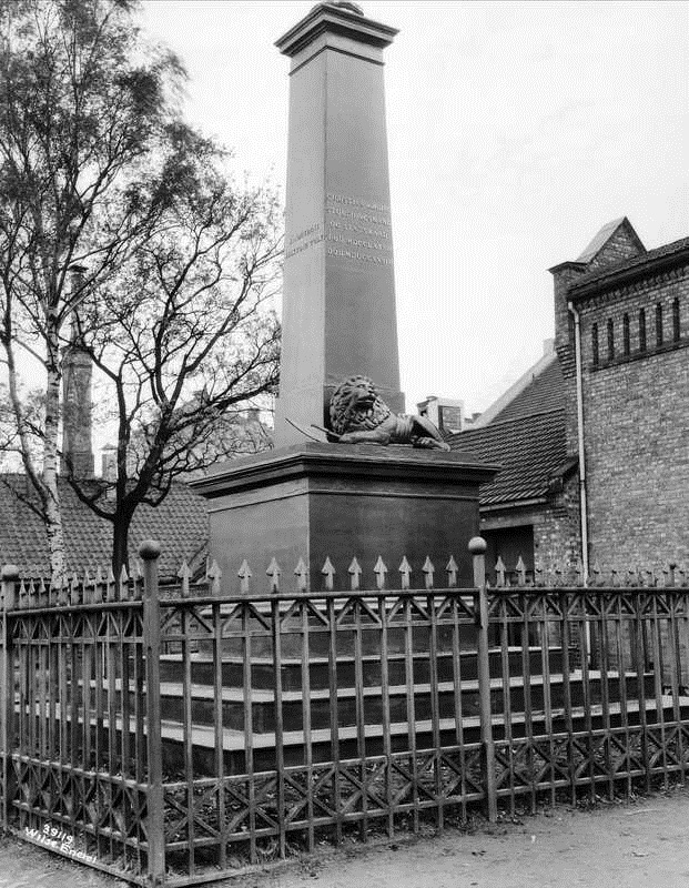 Krohgstøtten